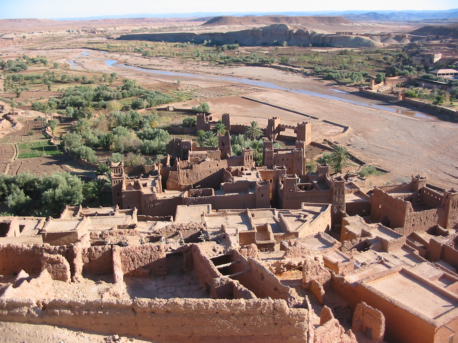 Aït Benhaddou from above